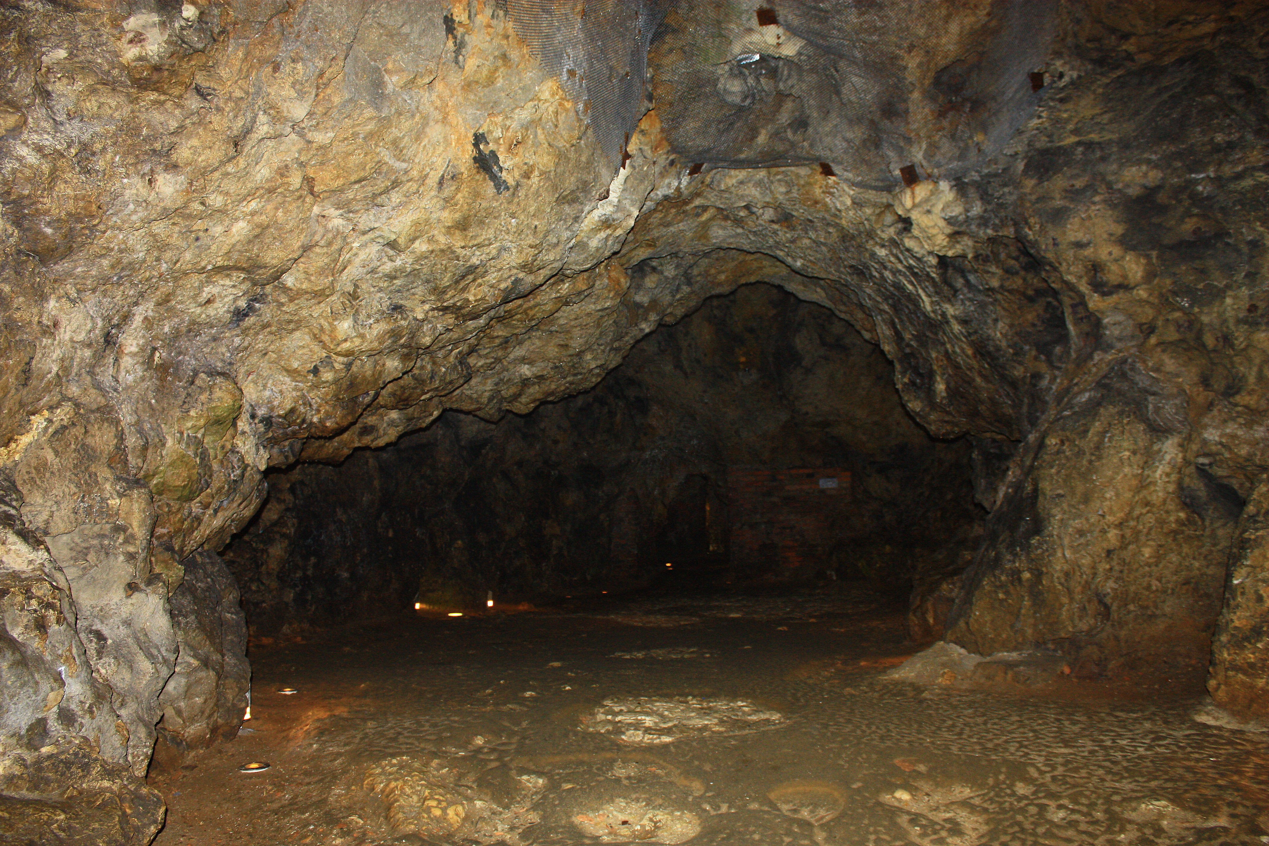 Kraków, Smocza Jama